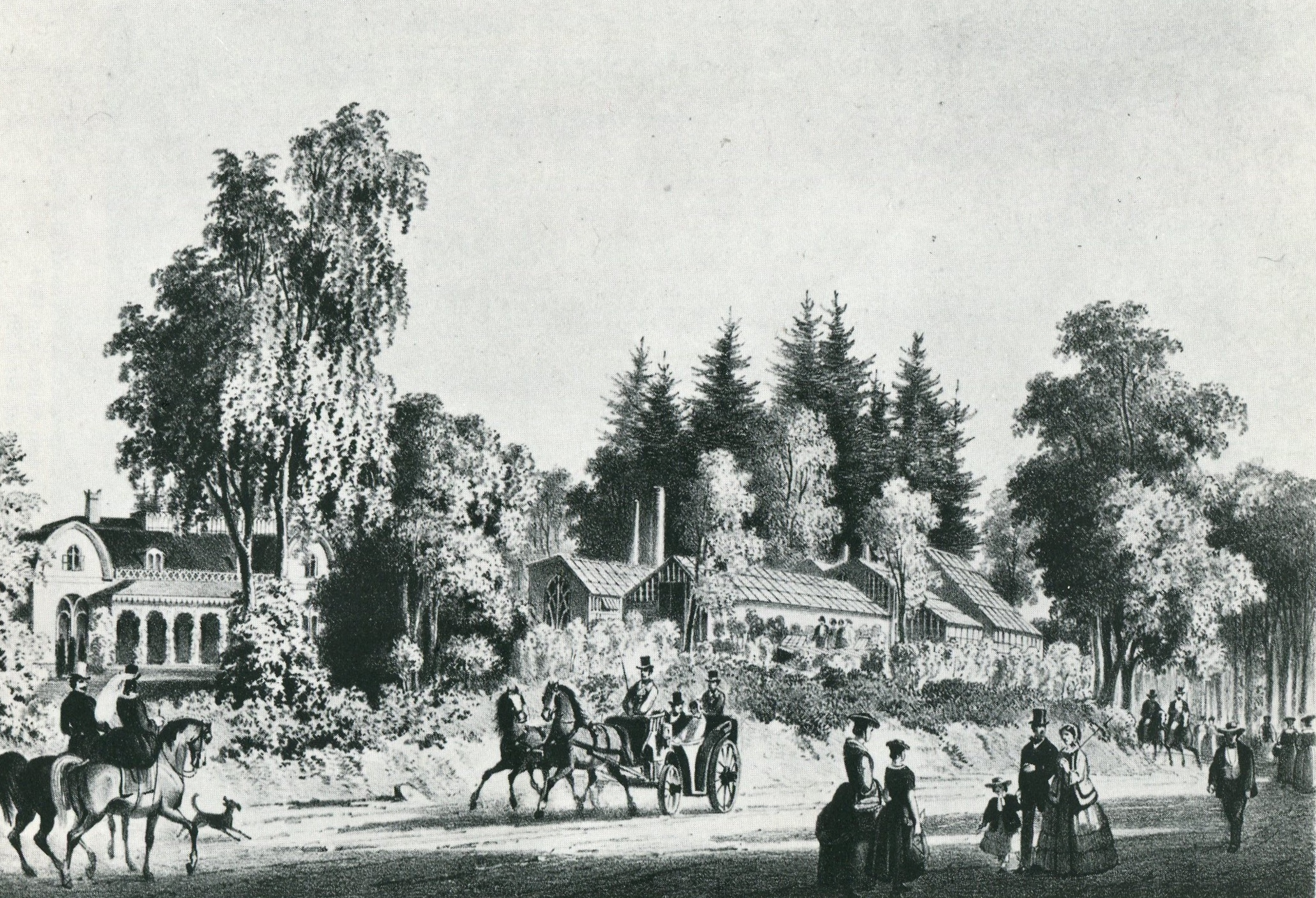 Gärtnerei und Baumschule in Hamburg-Flottbek des schottischen Landschaftsgärtners James Booth, Lithografie von Wilhelm Heuer